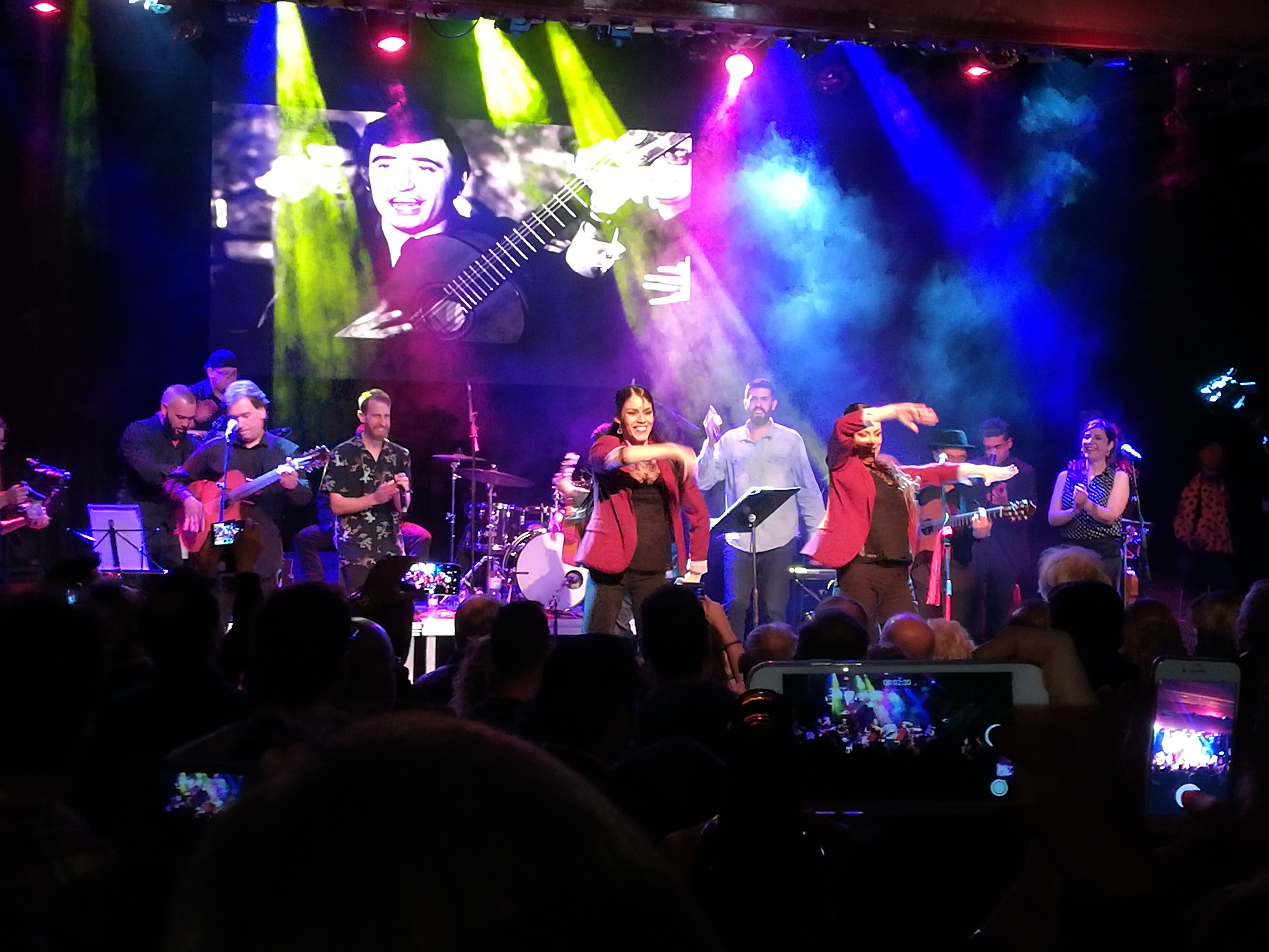 Sabor de Gràcia a la sala "Luz de Gas" de Barcelona el 15/3/2018, presentant el seu nou disc "Sabor a Peret". A la imatge, entre d'altres, hi apareixen Ramon del Pichón, els membres de La Pegatina Rubén Sierra i Adrià Salas, les ballarines Montse Selma i Mar Bachs i la violinista Carol Duran de La Carrau (en Sicus Carbonell no es veu perquè queda tapat per les ballarines).